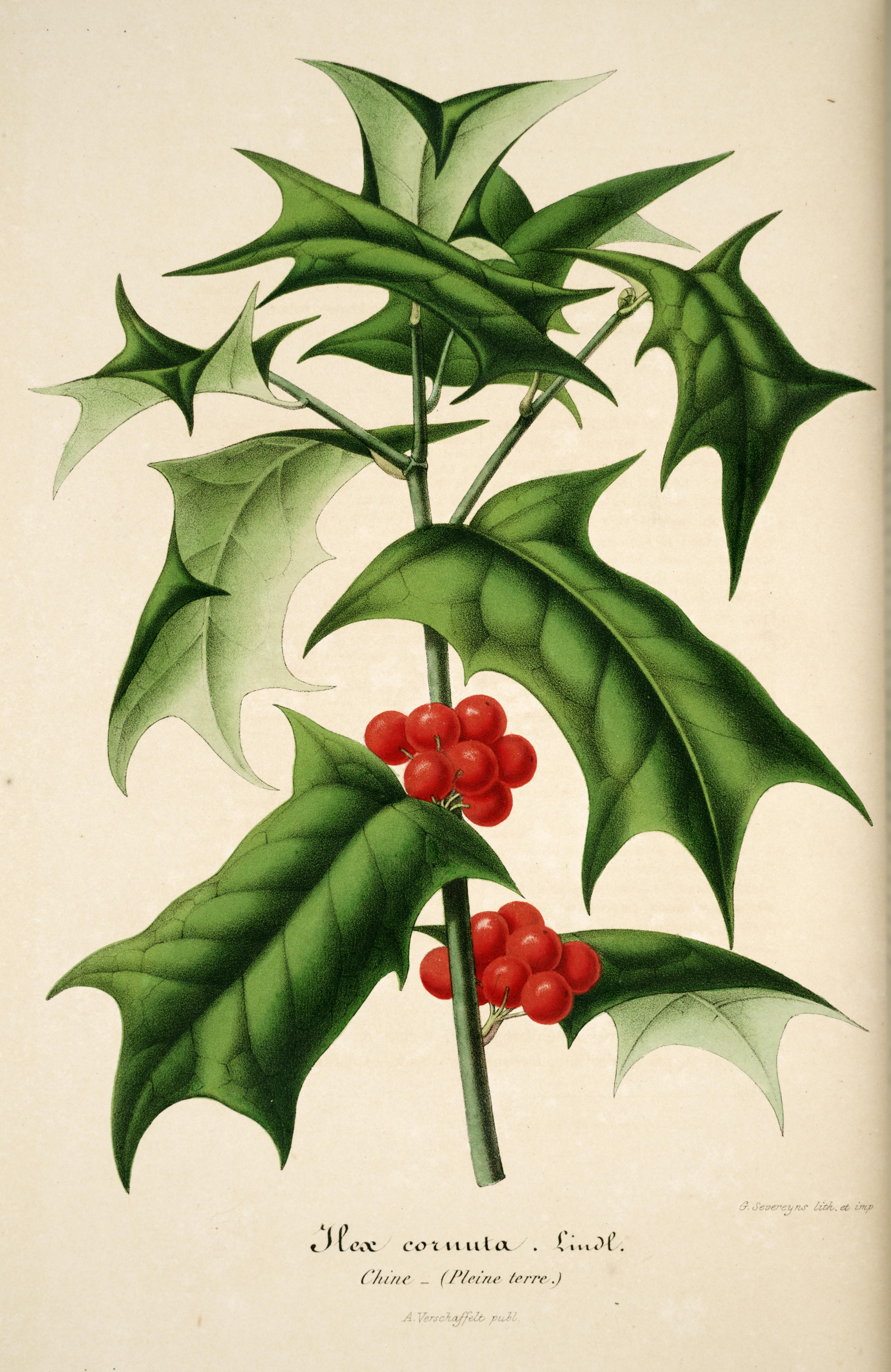 L'Illustration horticole : journal spécial des serres et des jardins, ou choix raisonné des plantes les plus intérressantes sous le rapport ornemental, comprenant leur histoire complete, leur description comparée, leur figure et leur culture /